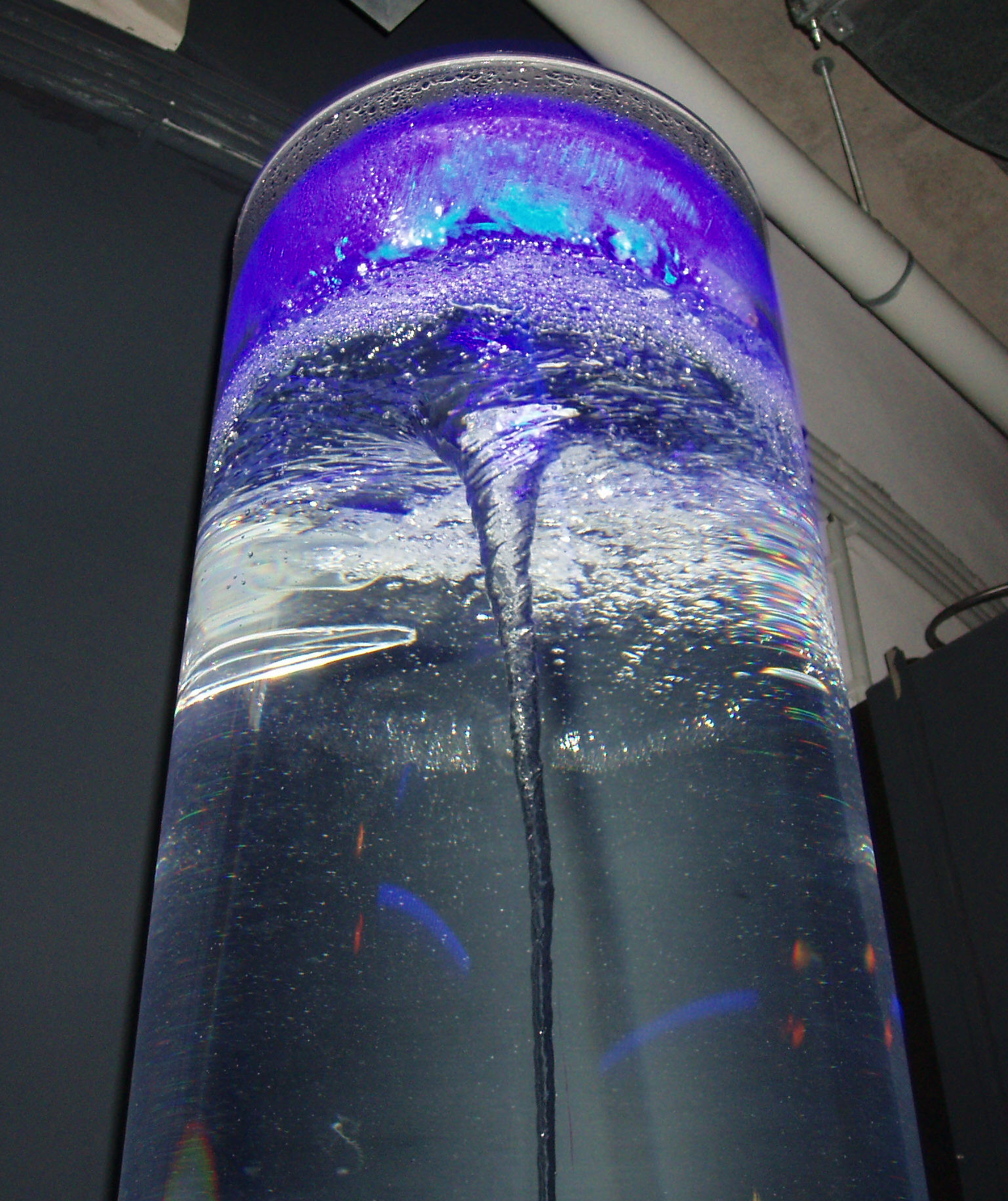 Veranschaulichung von Sogwirkung